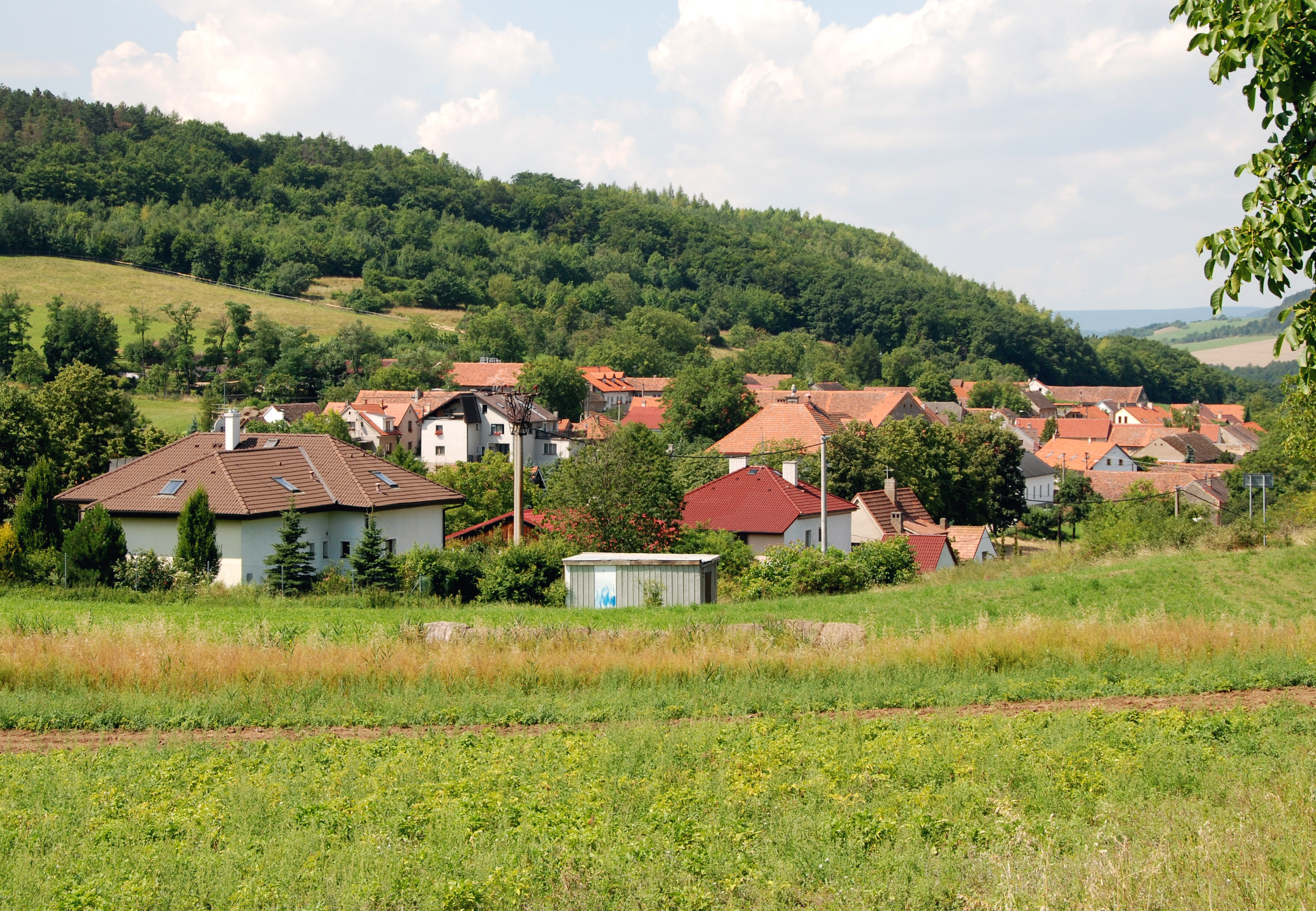 Koněprusy - vesnice Celkový pohled na Koněprusy z východu